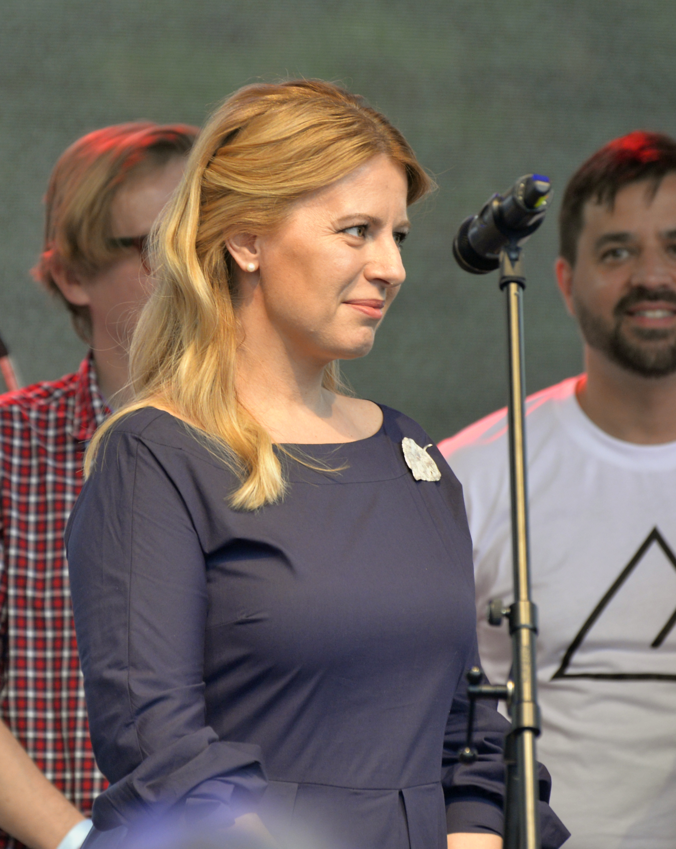 Zuzana Čaputová na první oficiální návštěvě v Praze, na koncertu Zuzana není sama doma